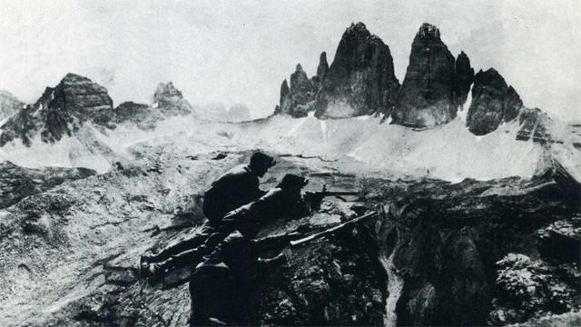 Avstrijska patrulja v Dolomitih.